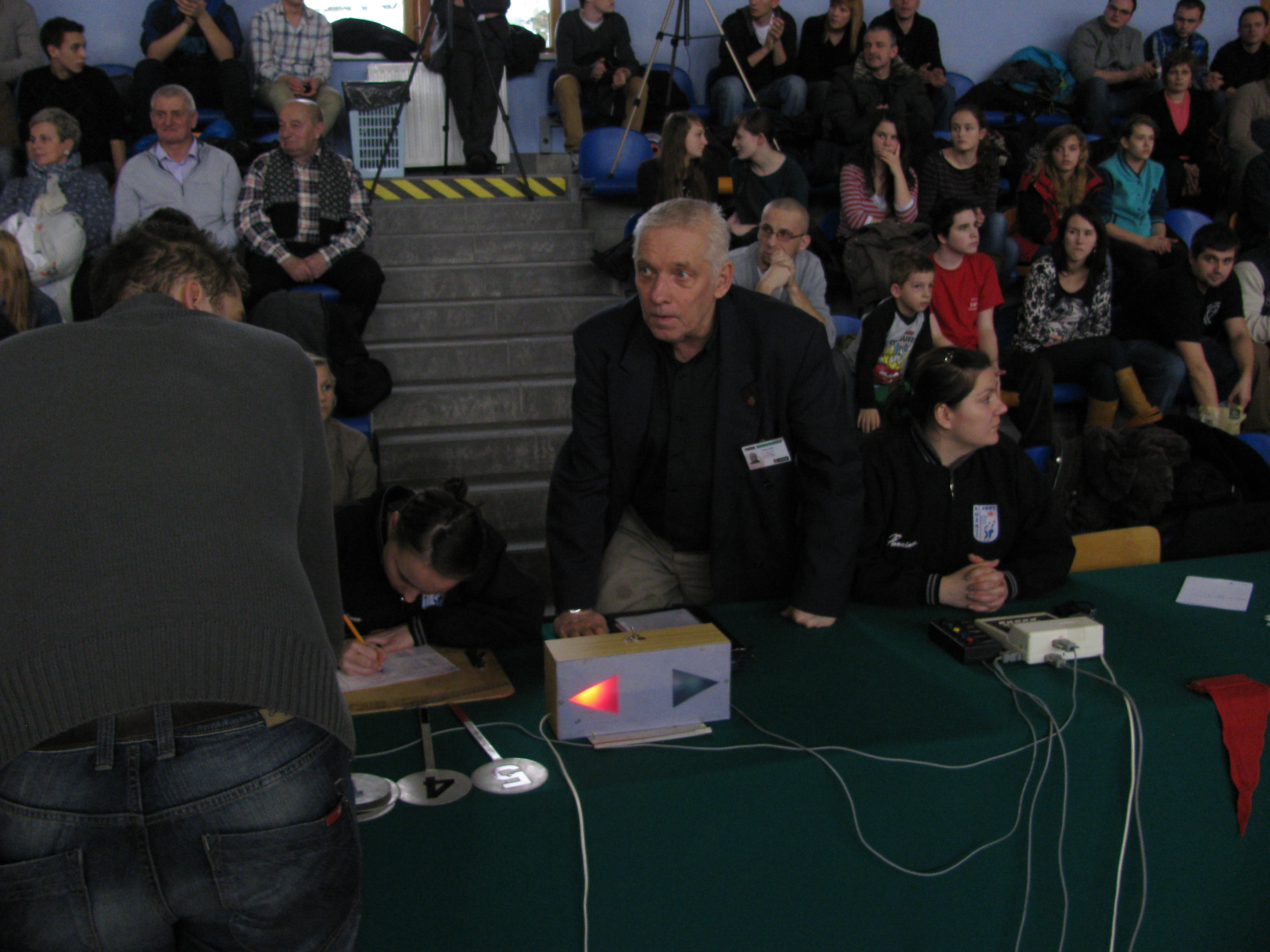 Strzałka naprzemiennego posiadania piłki w sytuacjach rzutu sędziowskiego - wersja elektryczna. Wadowice - półfinały mistrzostw Polski juniorów starszych w koszykówce.